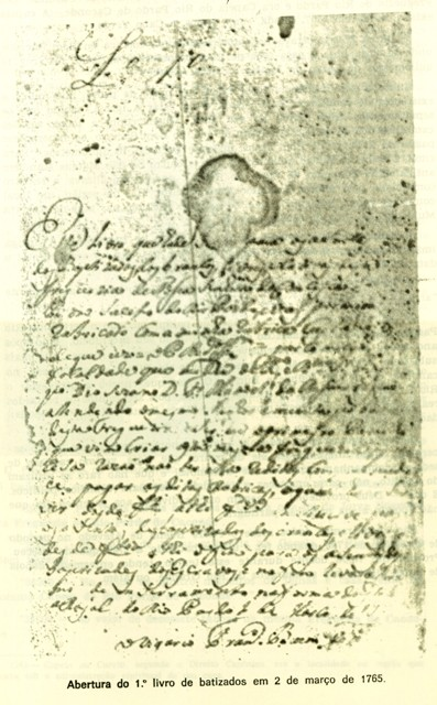 Primeiro termo de batismo (1765) da Paróquia Santuário Imaculada Conceição de Caconde.